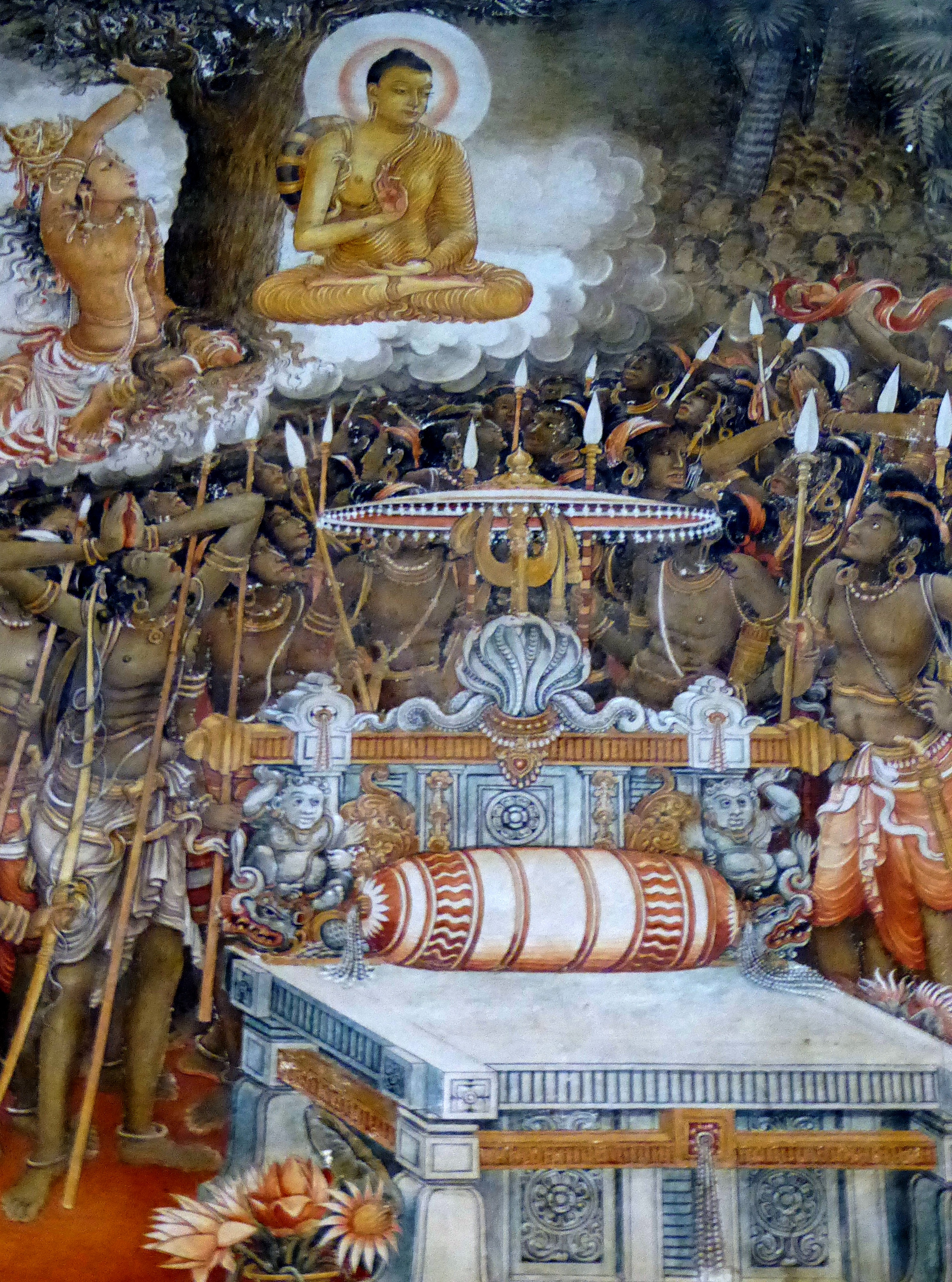 082 Buddha and the Naga Throne, Kelaniya Raja Maha Vihara